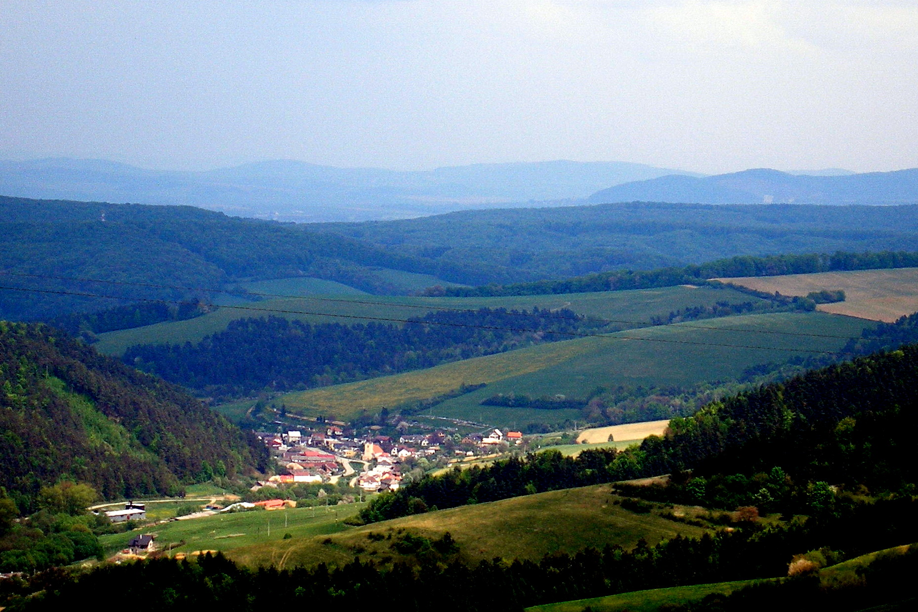 Obec Bajerov okres Prešov.